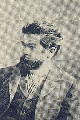 Fotografía del poeta de Uruguay, Juan Zorrilla de San Martín, hacia la década de 1890.